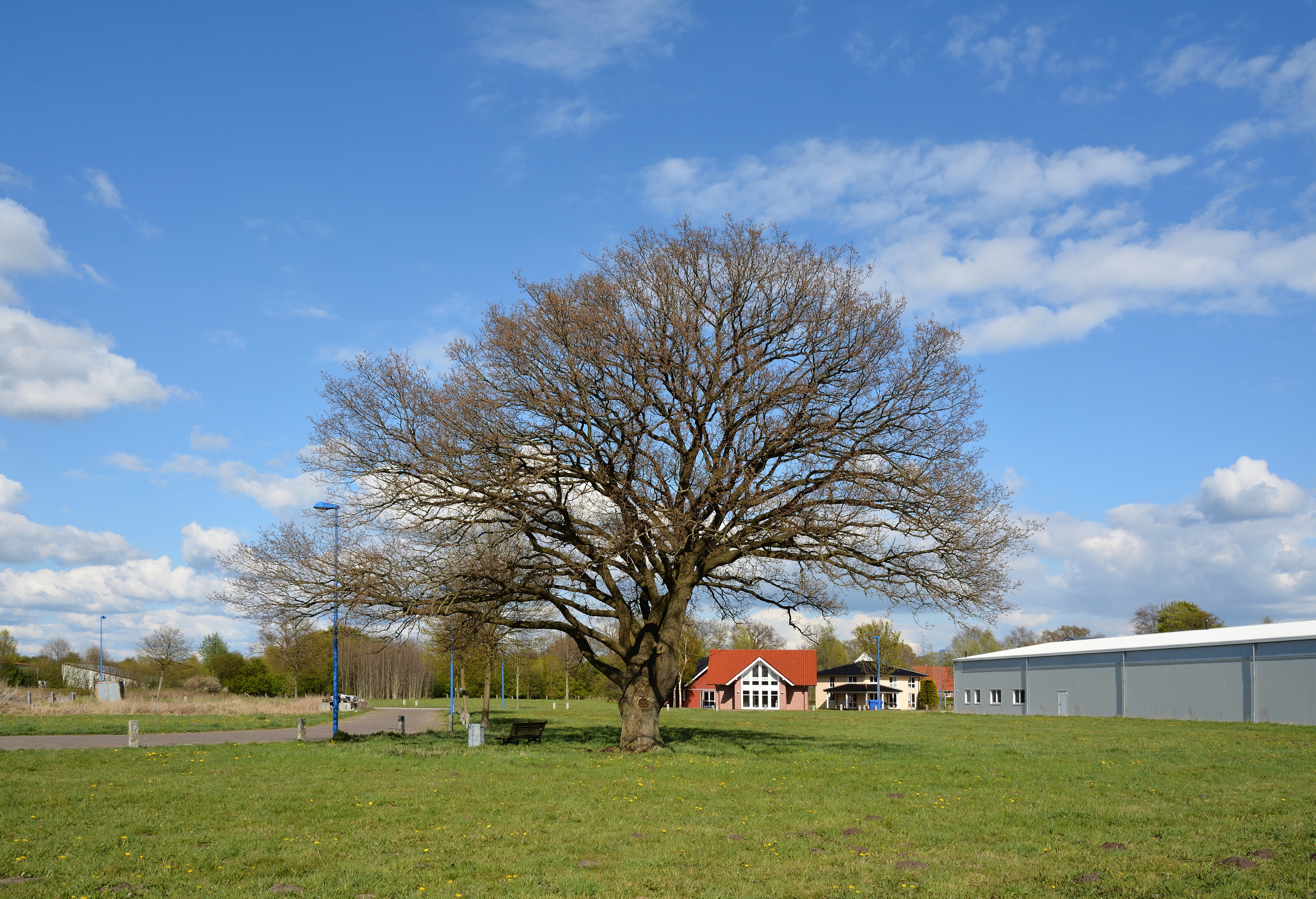 Naturdenkmal im Kreis Pinneberg Stieleiche, Heede, Gewerbegebiet am „Heeder Ring“